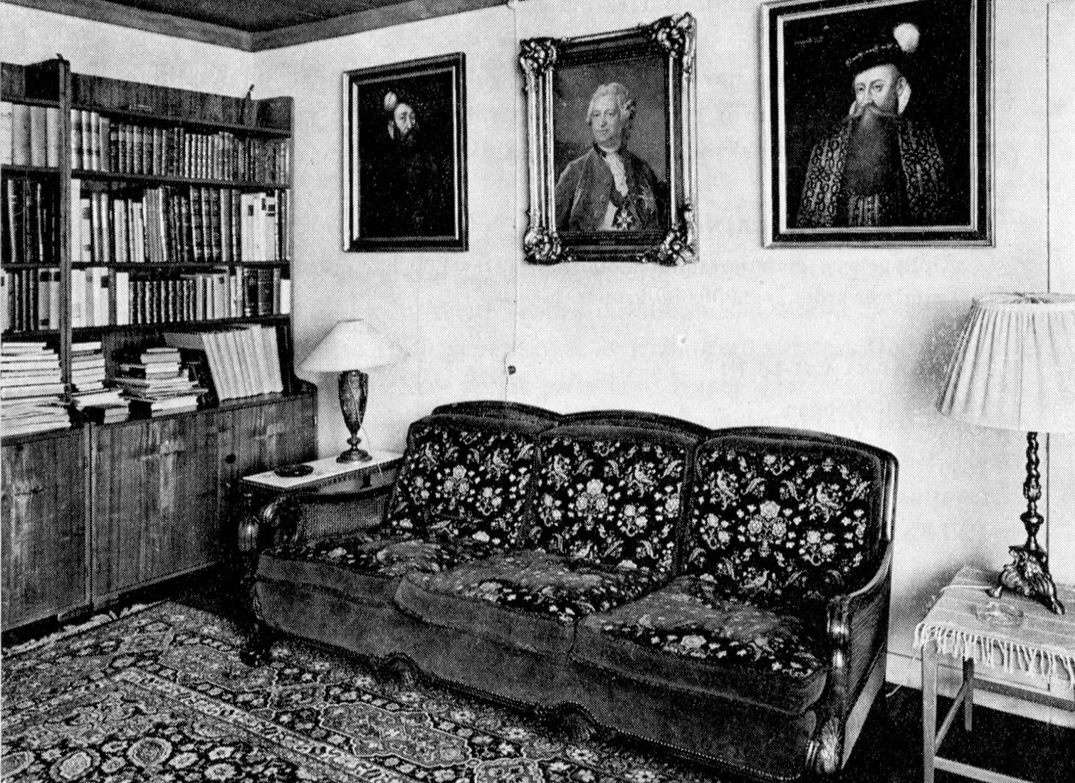 Kiplingebergs salong